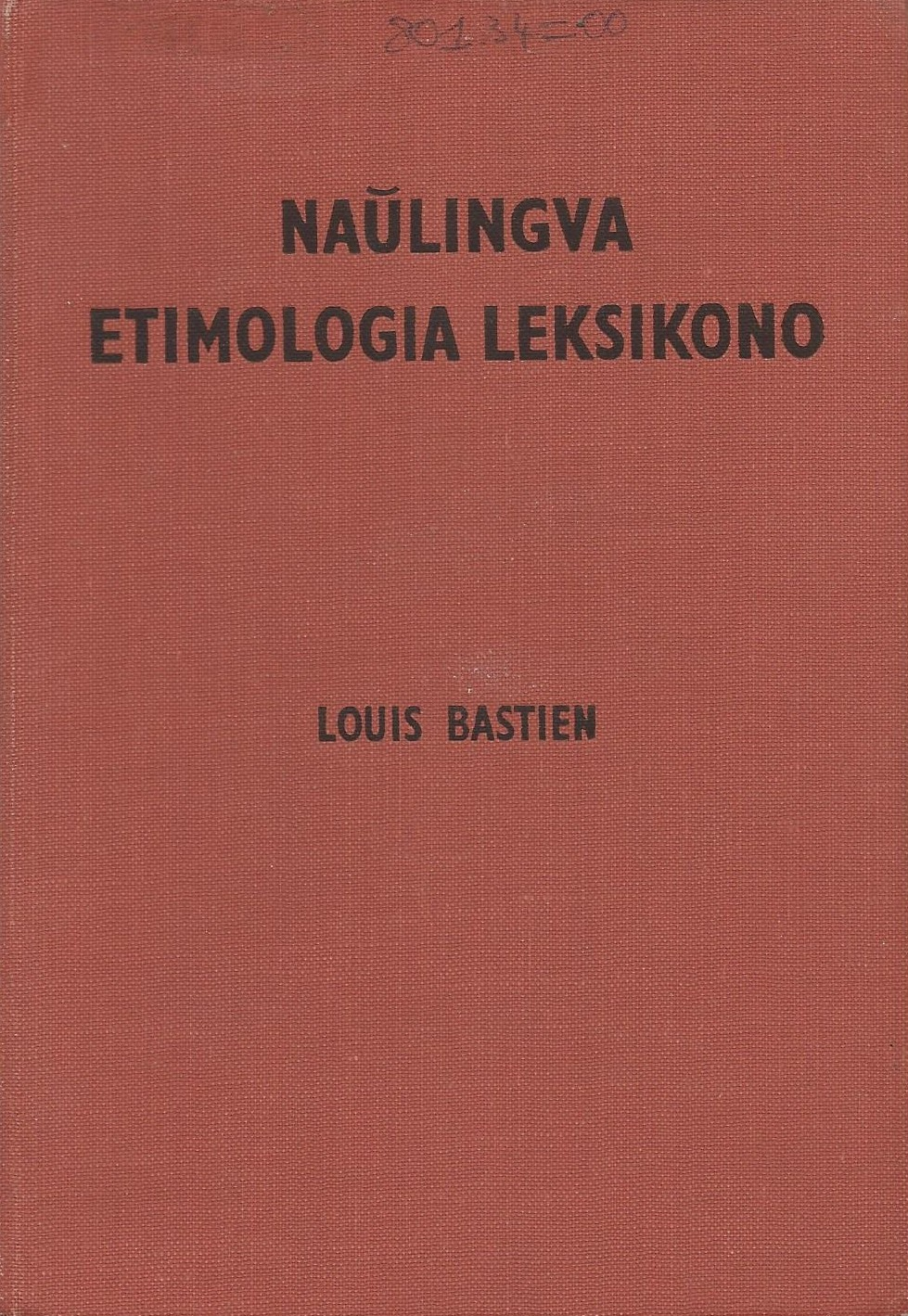 kovrilo de "Naŭlingva Etimologia Leksikono", 1950